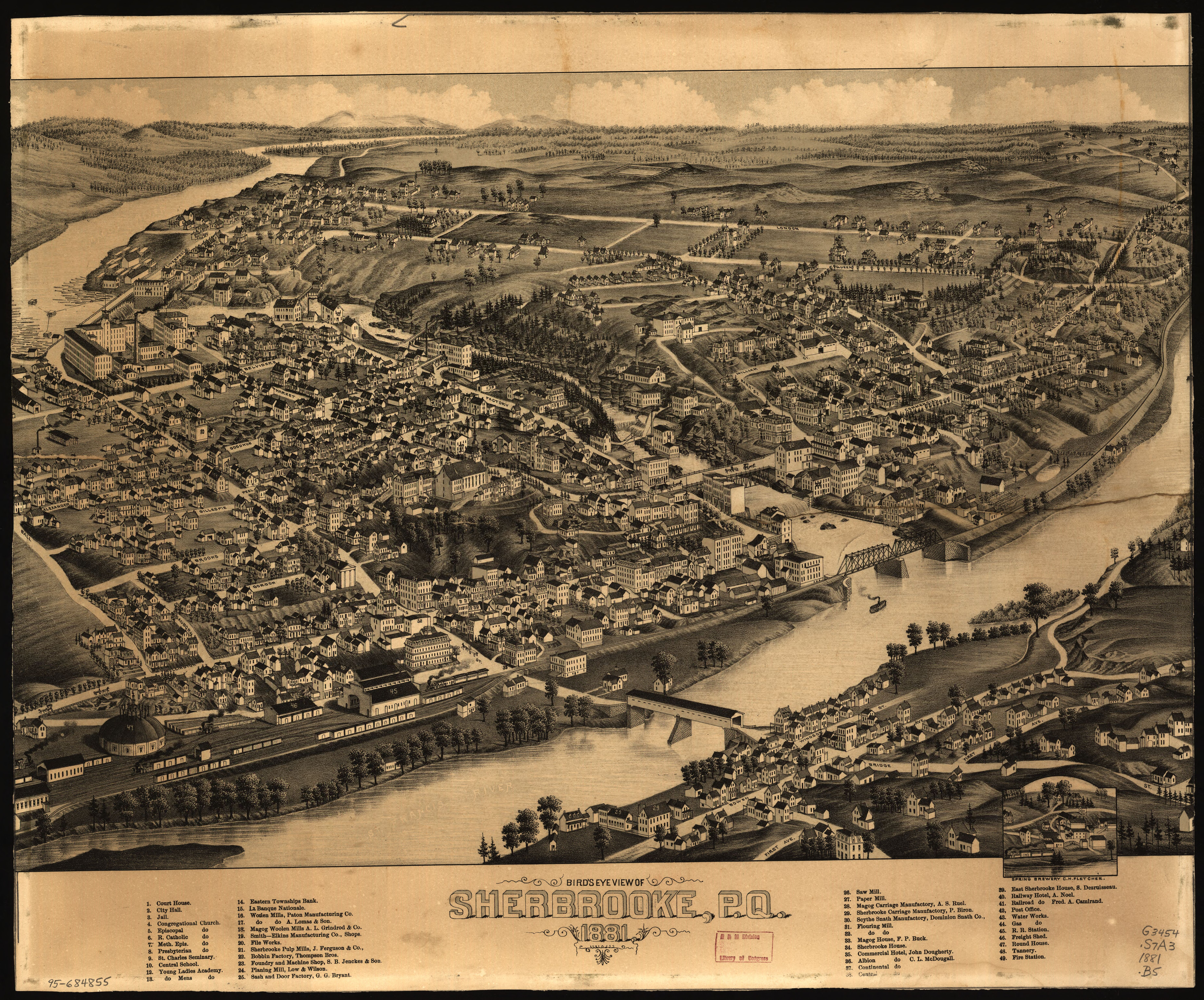 Sherbrooke à vol d'oiseau en 1881